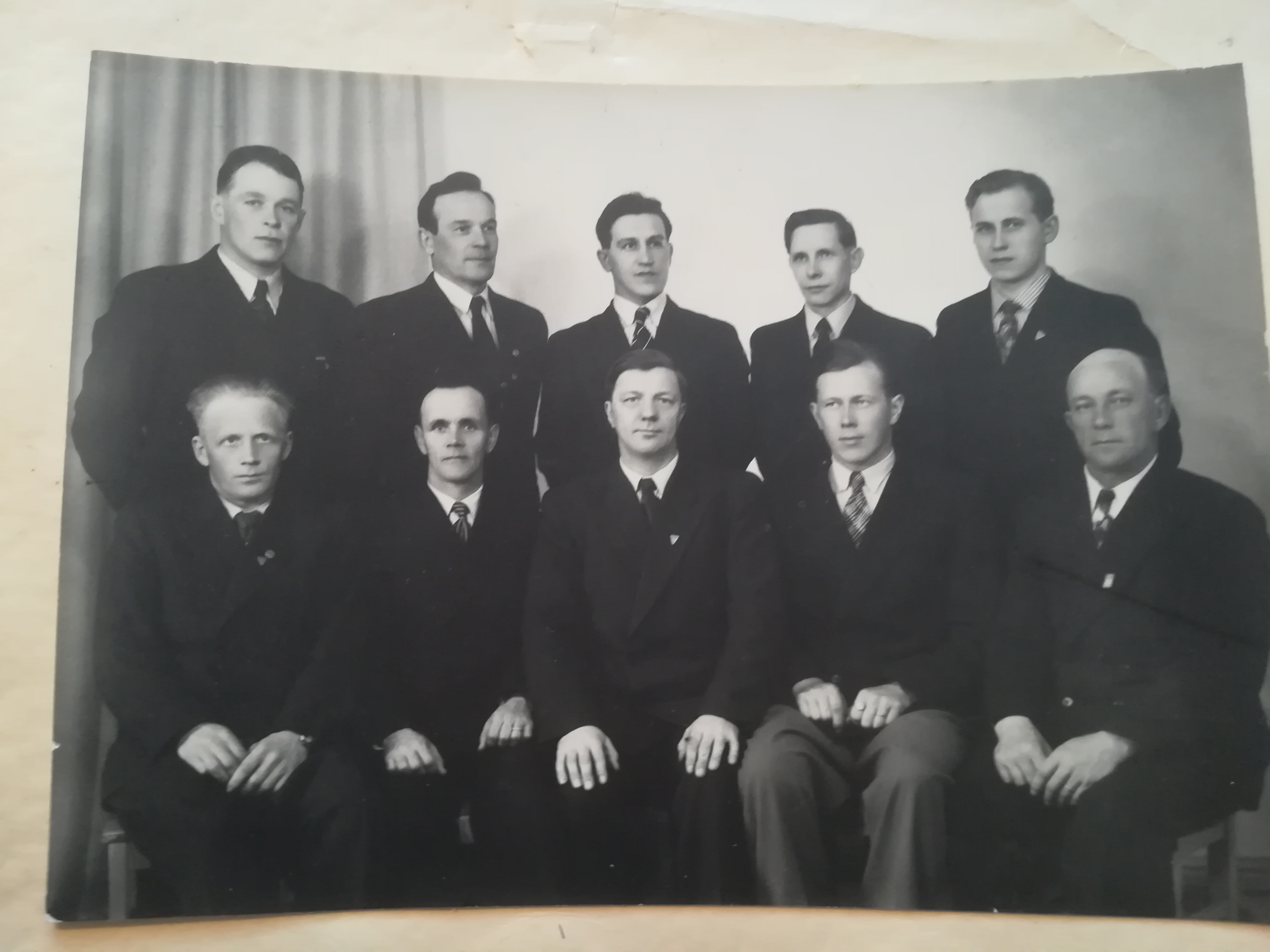 Karihaaran Visa perustajajäsenet v.1951